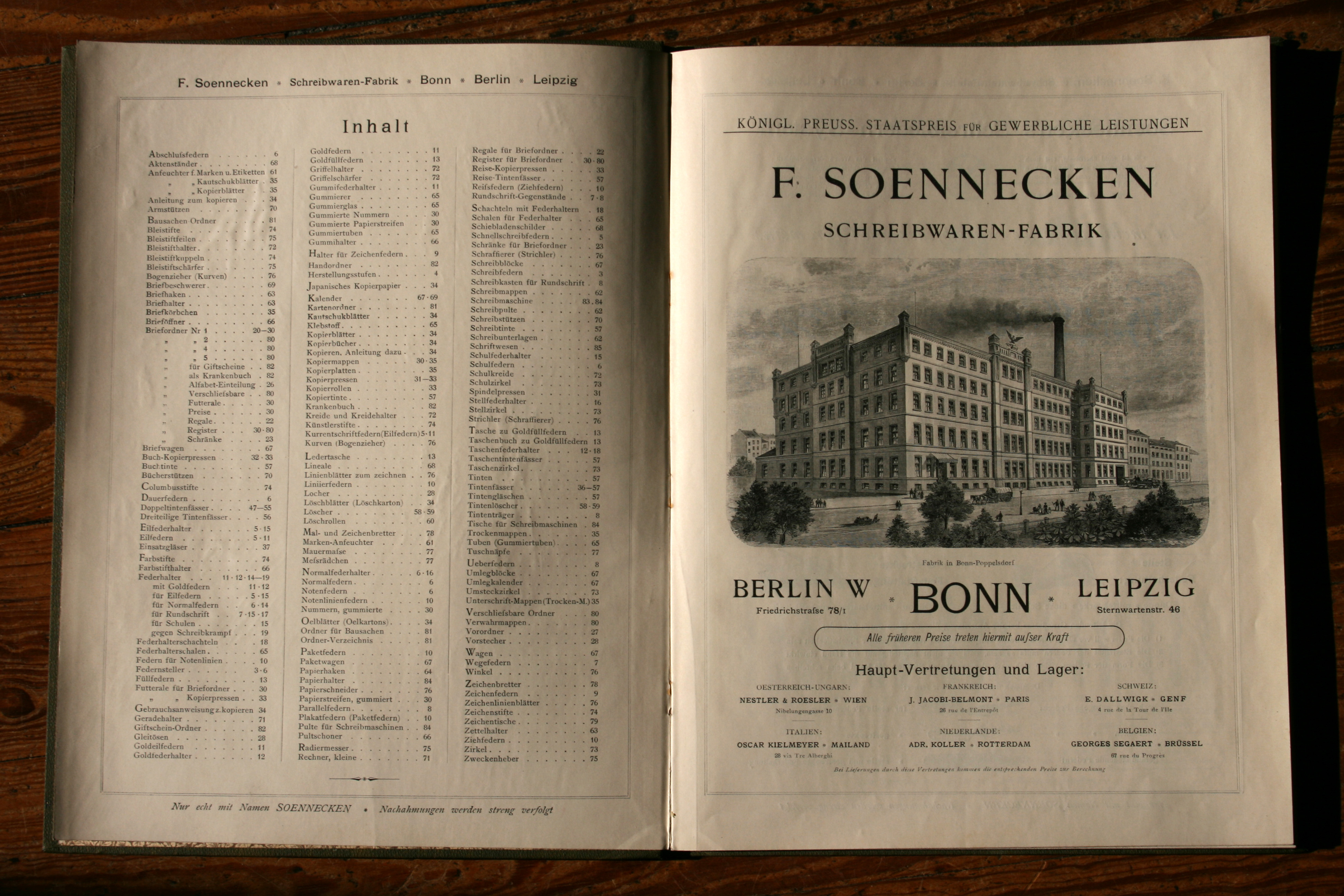 Schreibwarenkatalog des Unternehmens Soennecken von 1895